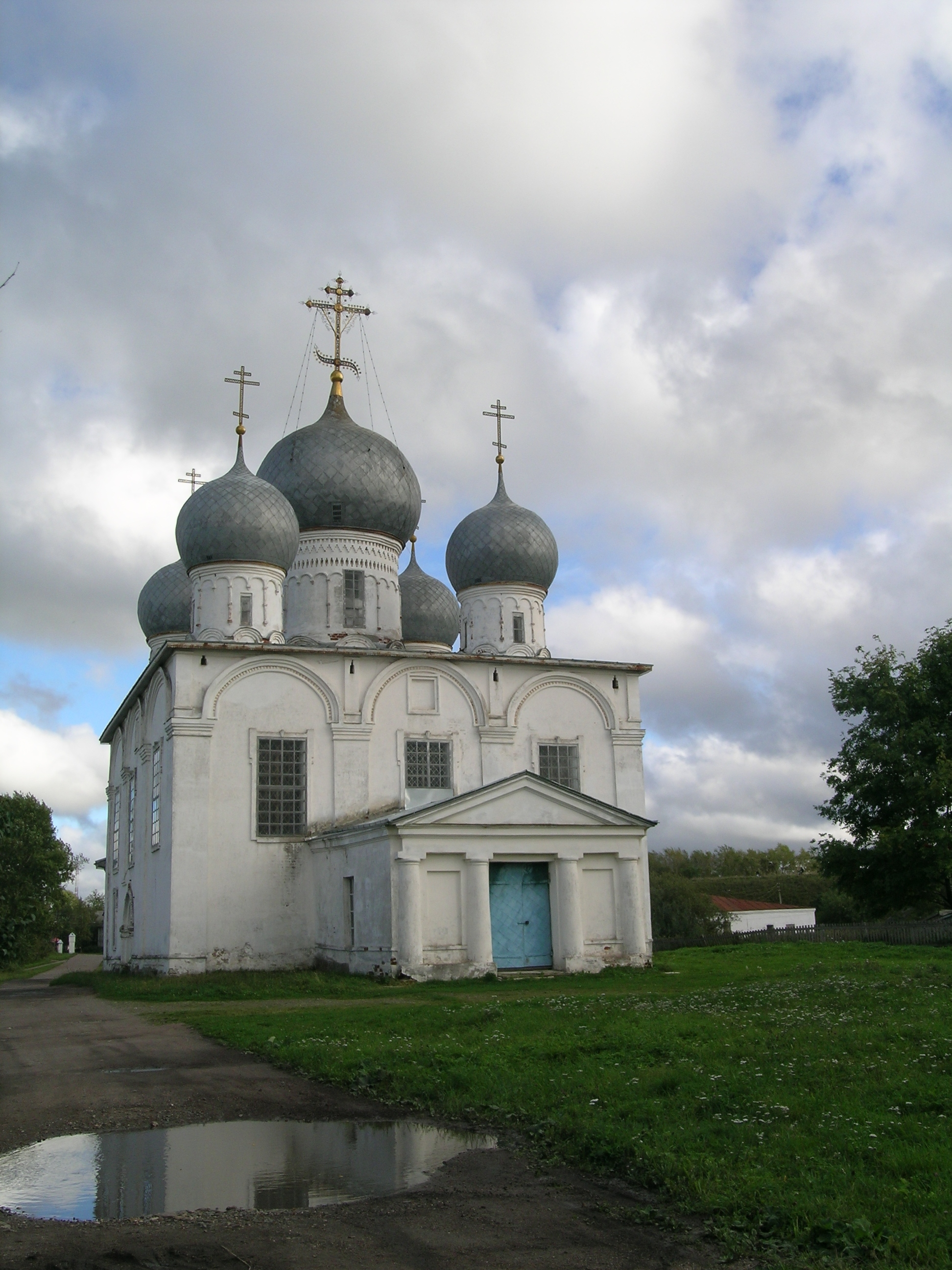 Собор Спасо-Преображения (Вологодская область, Белозерск, Советский вал улица, 13, 14)